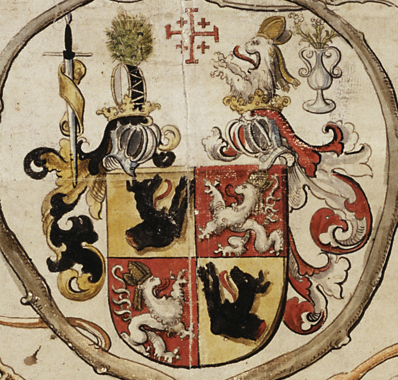 Stammbaum der Pfaffinger zu Salmanskirchen